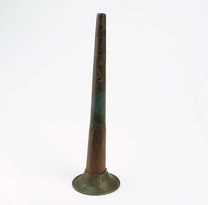 Blaasinstrument. Dubbelriet (schalmei) van hout